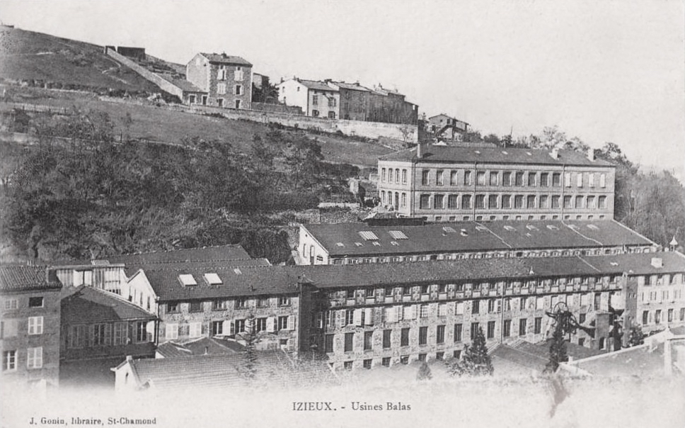 Izieux (Saint-Chamond), usines Balas, fabrication des rubans et des lacets.